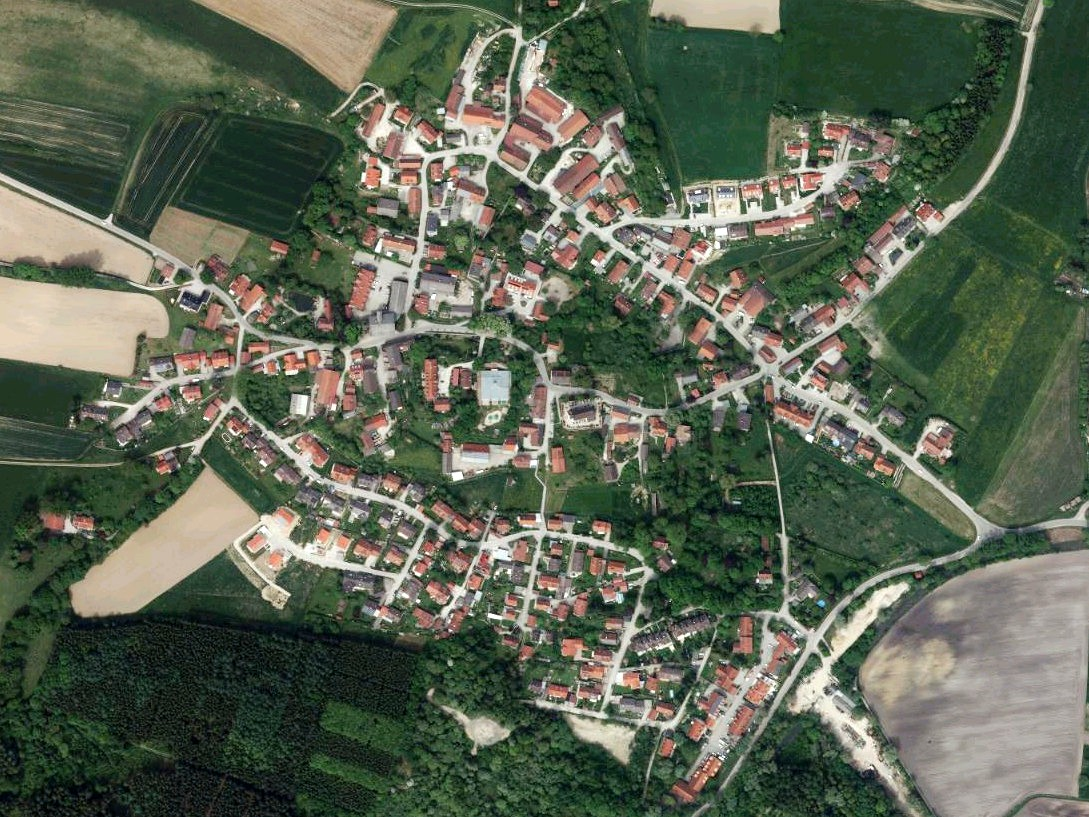 Luftaufnahme der Bayerischen Vermessungsverwaltung: Massenhausen, Gemeinde Neufahrn, Landkreis Freising, Regierungsbezirk Oberbayern, Bayern.